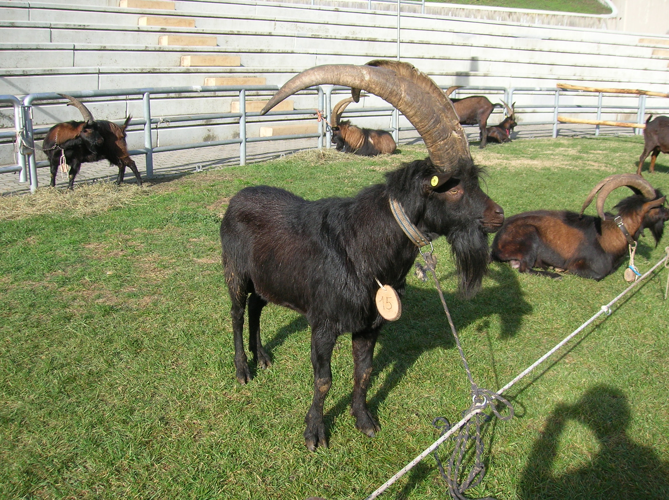 Razza Valdostana. Fête des Alpes 2011, Aosta.